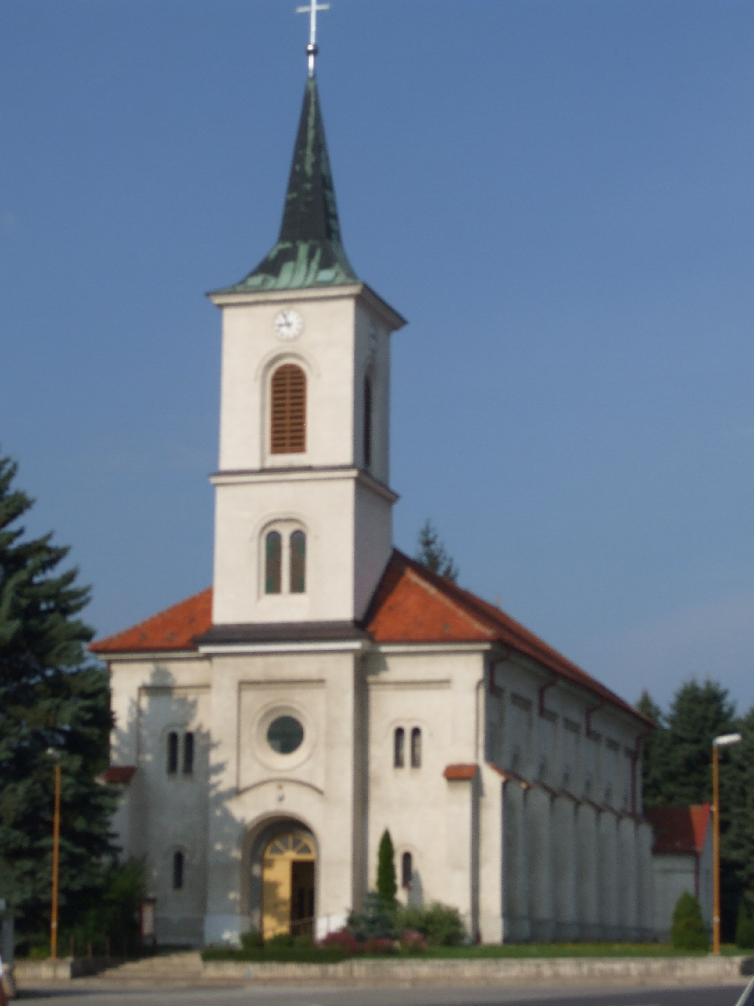 Kostol Panny Márie Snežnej.